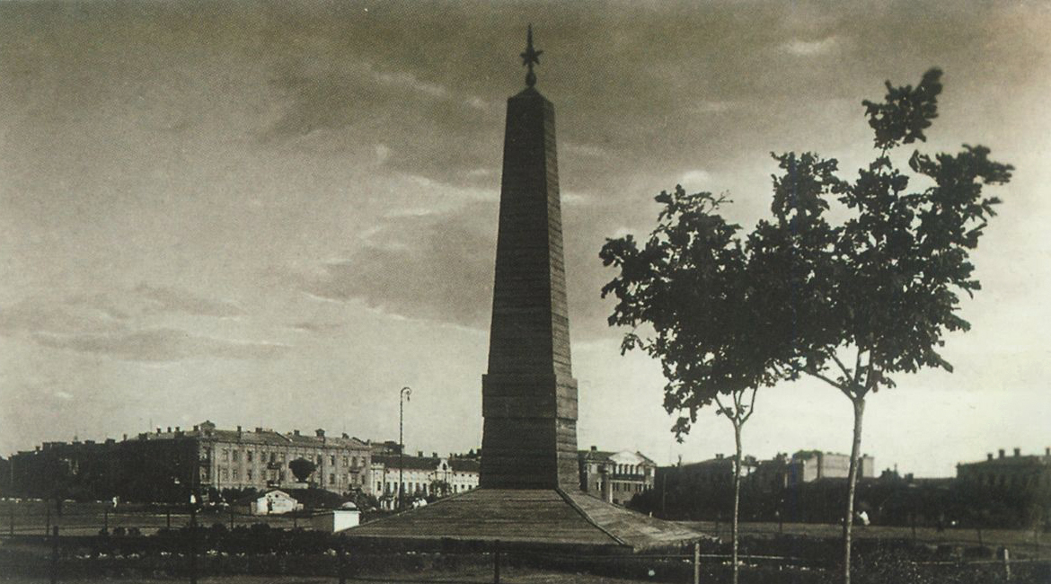 Пам'ятник "Героям революції". Архітектор - Адольф Мінкус